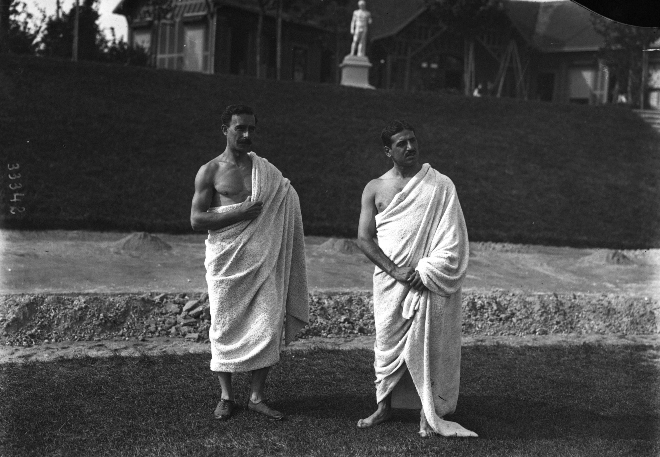 Bouin et lieutenant Hébert portant une toge - photographie de presse/Agence Rol au parc Pommery.